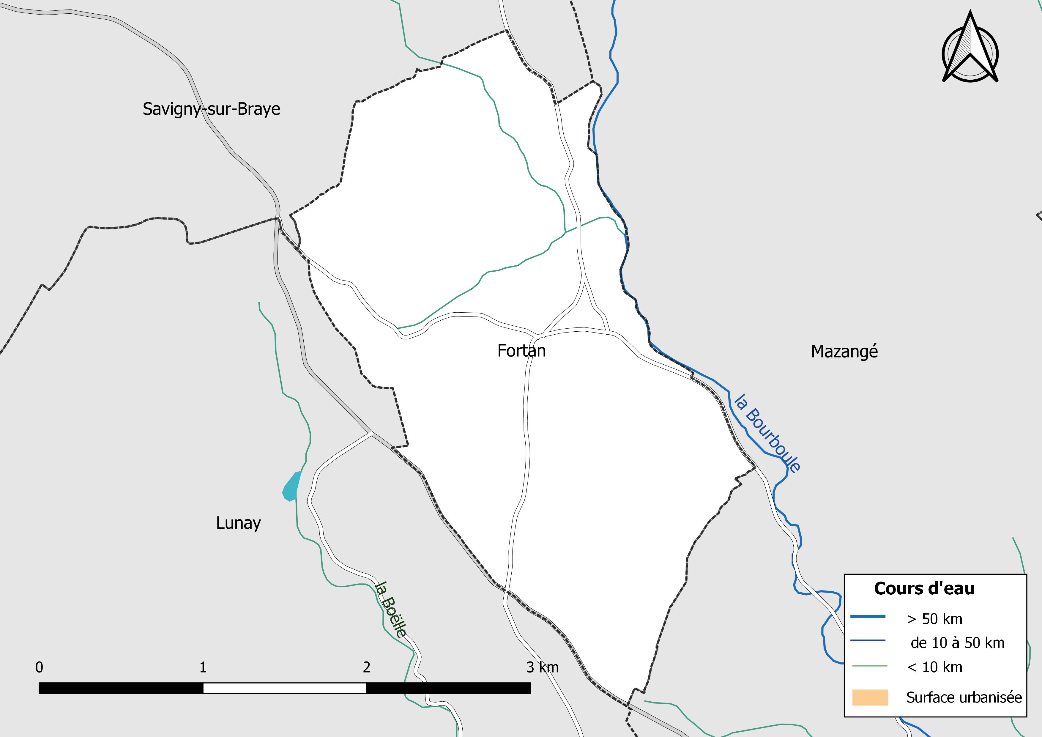 Carte du réseau hydrographique de la commune de Fortan (Loir-et-Cher, France).